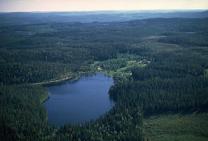 Motiv: Gudmundstjärn Nyckelord: Flygbilder, Riksintressen Kategori: SkogslandskapGudmundstjärn